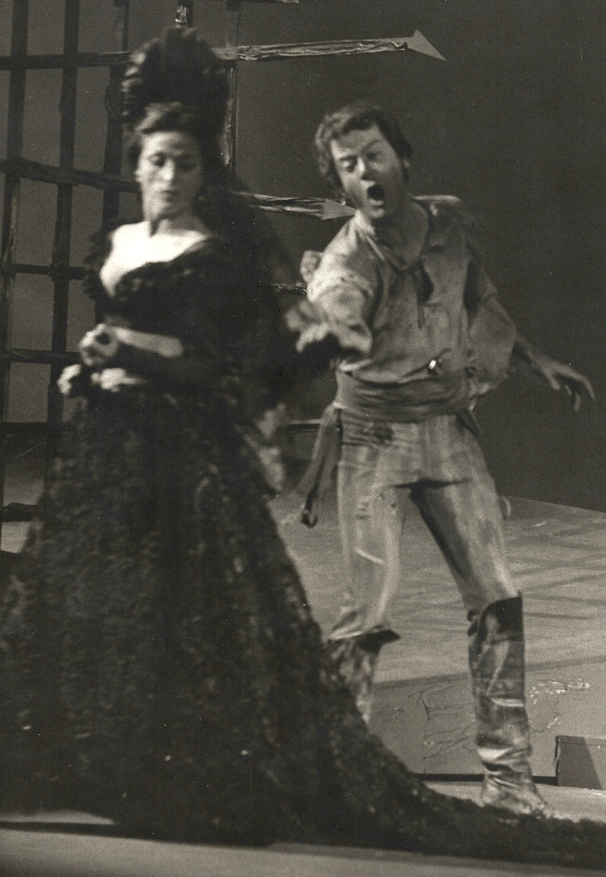 "Carmen" de Bizet avec Bernard Muracciole (Don José) and Géori Boué (Carmen)